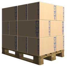 Euro-pallet pronto per la spedizione